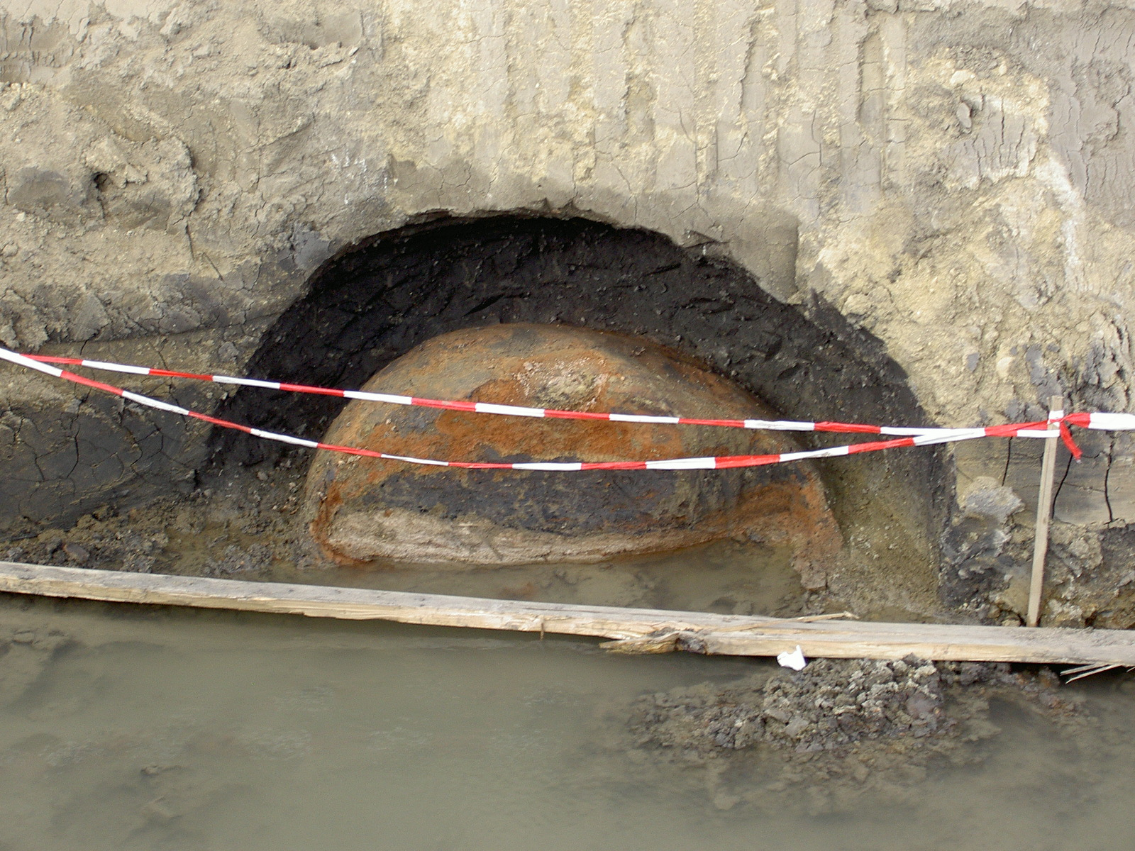 Frühmittelalterlicher Backofen, freigelegt durch das Bundesdenkmalamt.